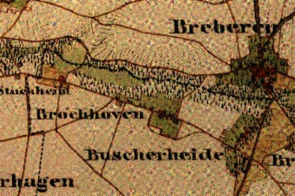 Preußische Kartenaufnahme 1846 -Uraufnahme- (Gangelt)